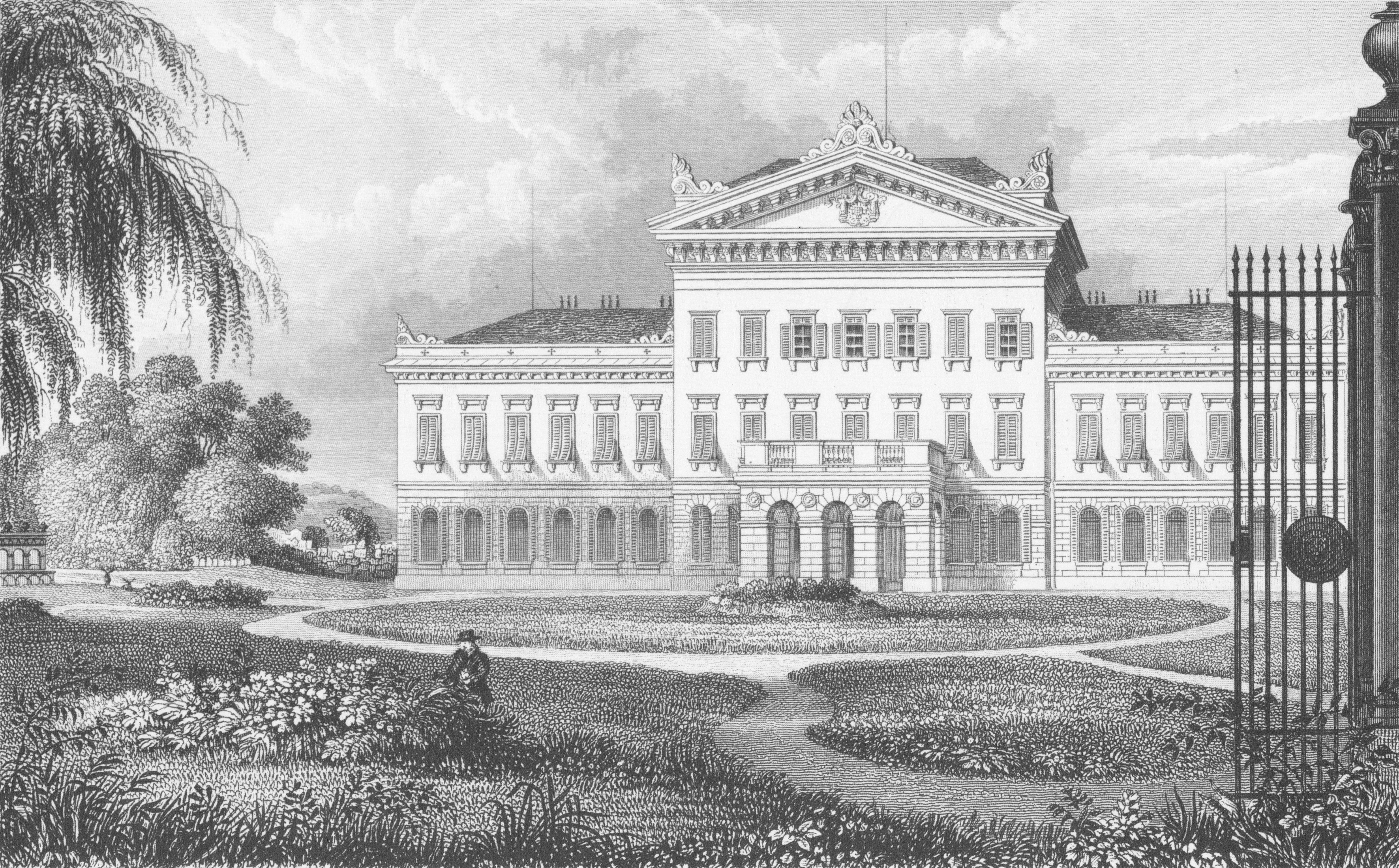 Wohngebäude sr. kaiserl. königl. Hoheit Erzherzog Johann Baptist.